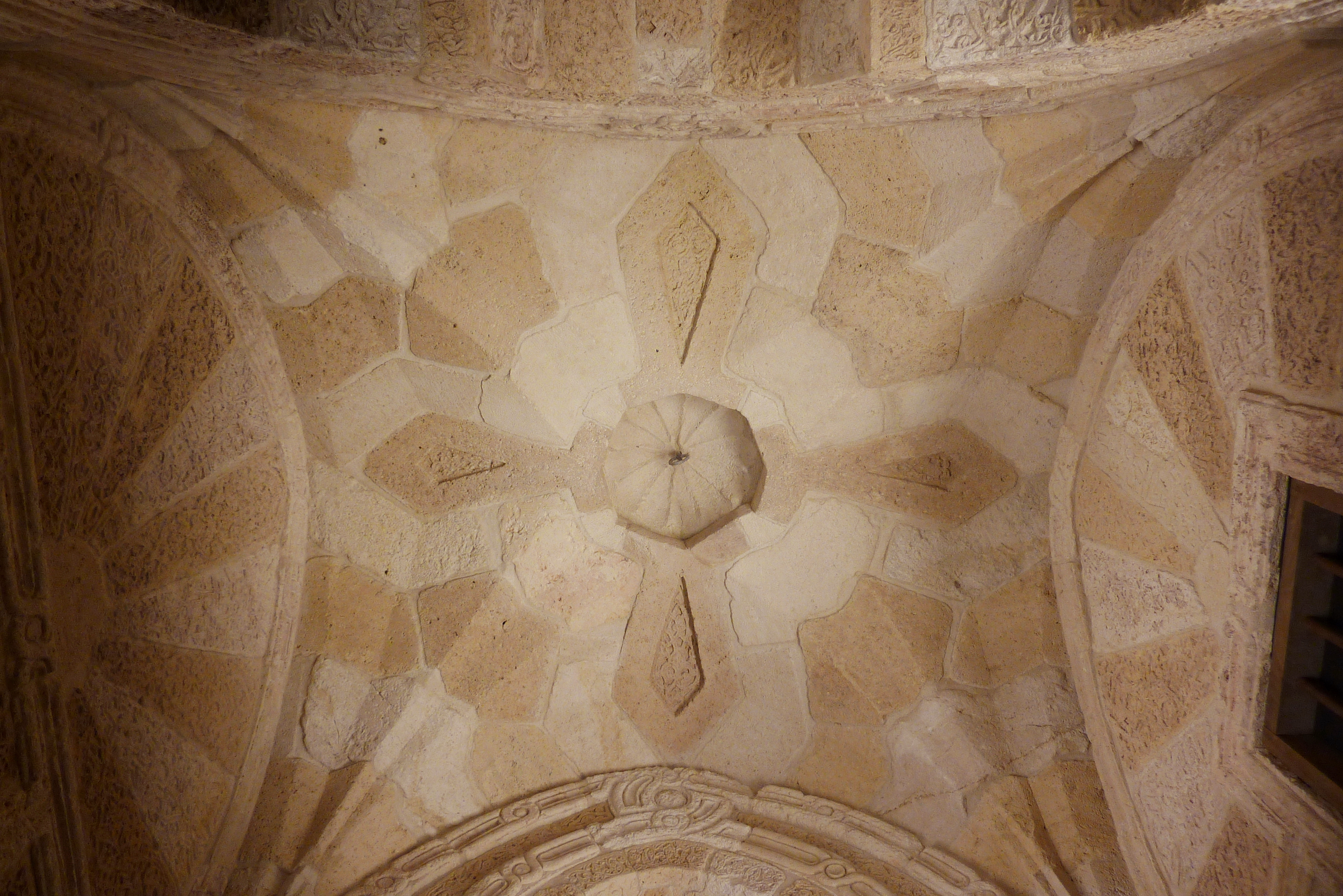 Porche Mamlouk, Torbau eines Wohnhauseses in Kairo aus der 2. Hälfte des 15. Jahrhunderts; Abteilung Kunst des Islam im Louvre in Paris